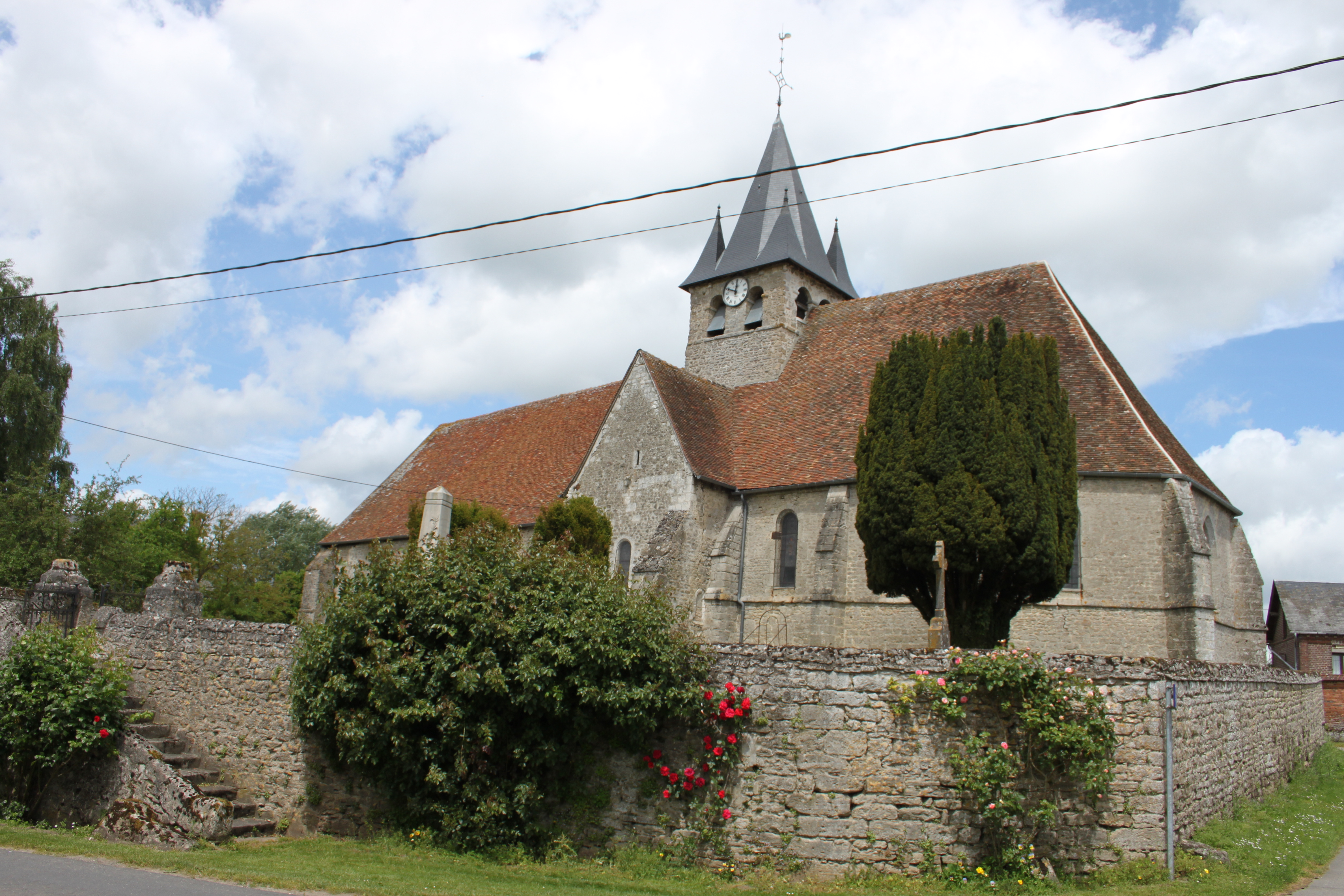 église de dampierre-en-bray